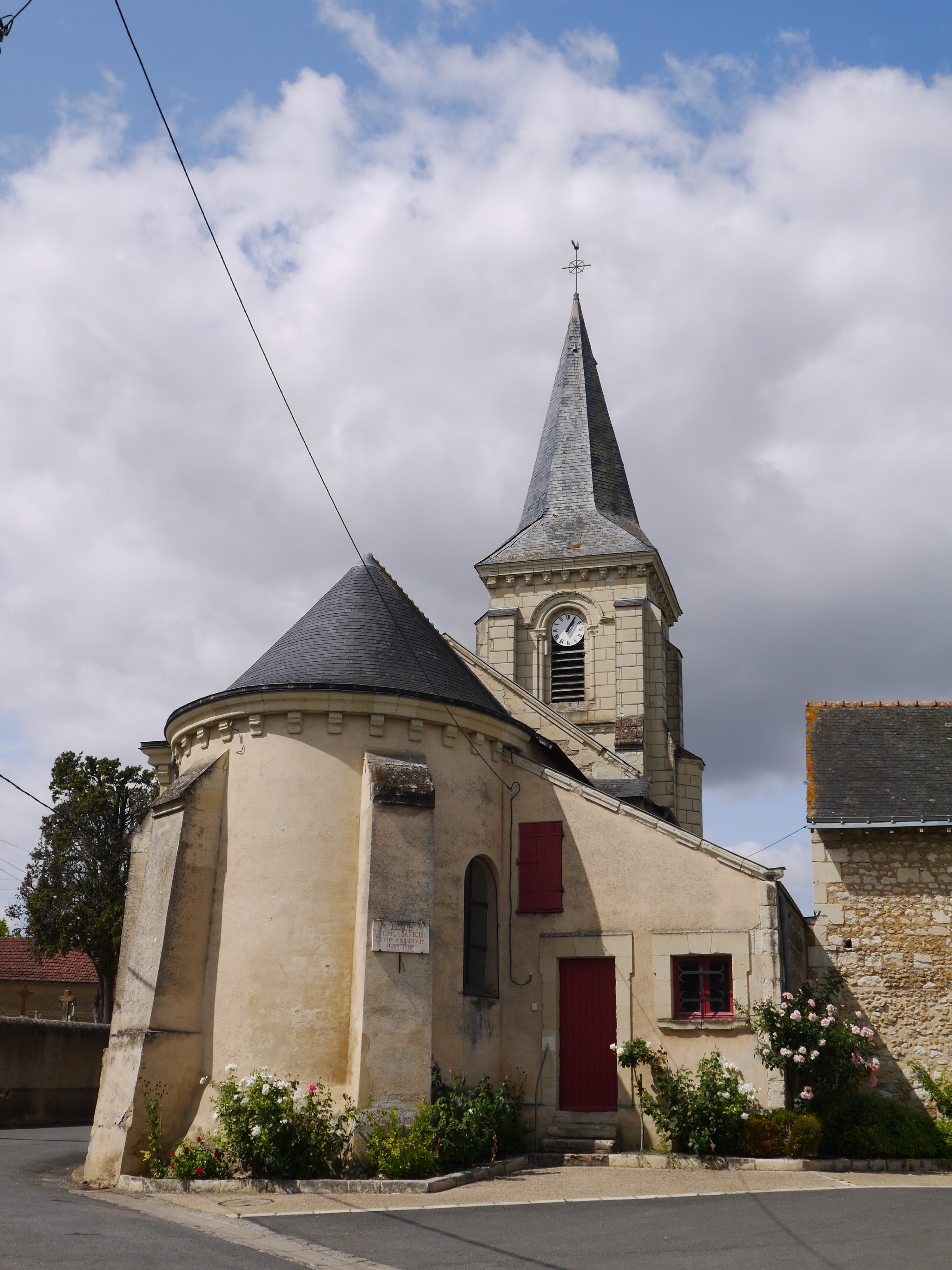 L'église Saint-Nicolas.